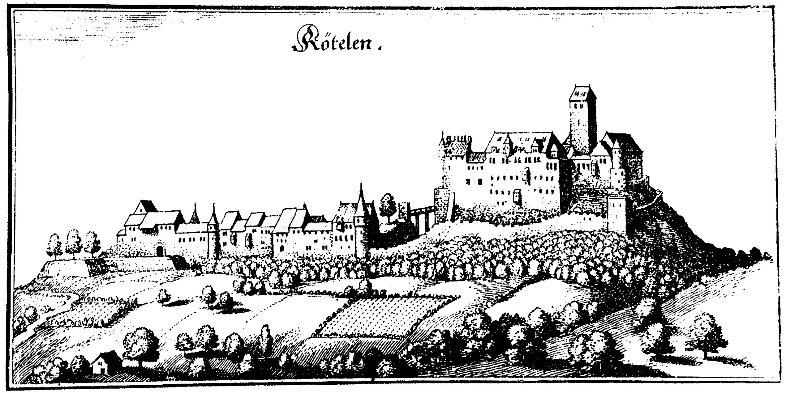 Burg Rötteln, Stich von Matthäus Merian 1643